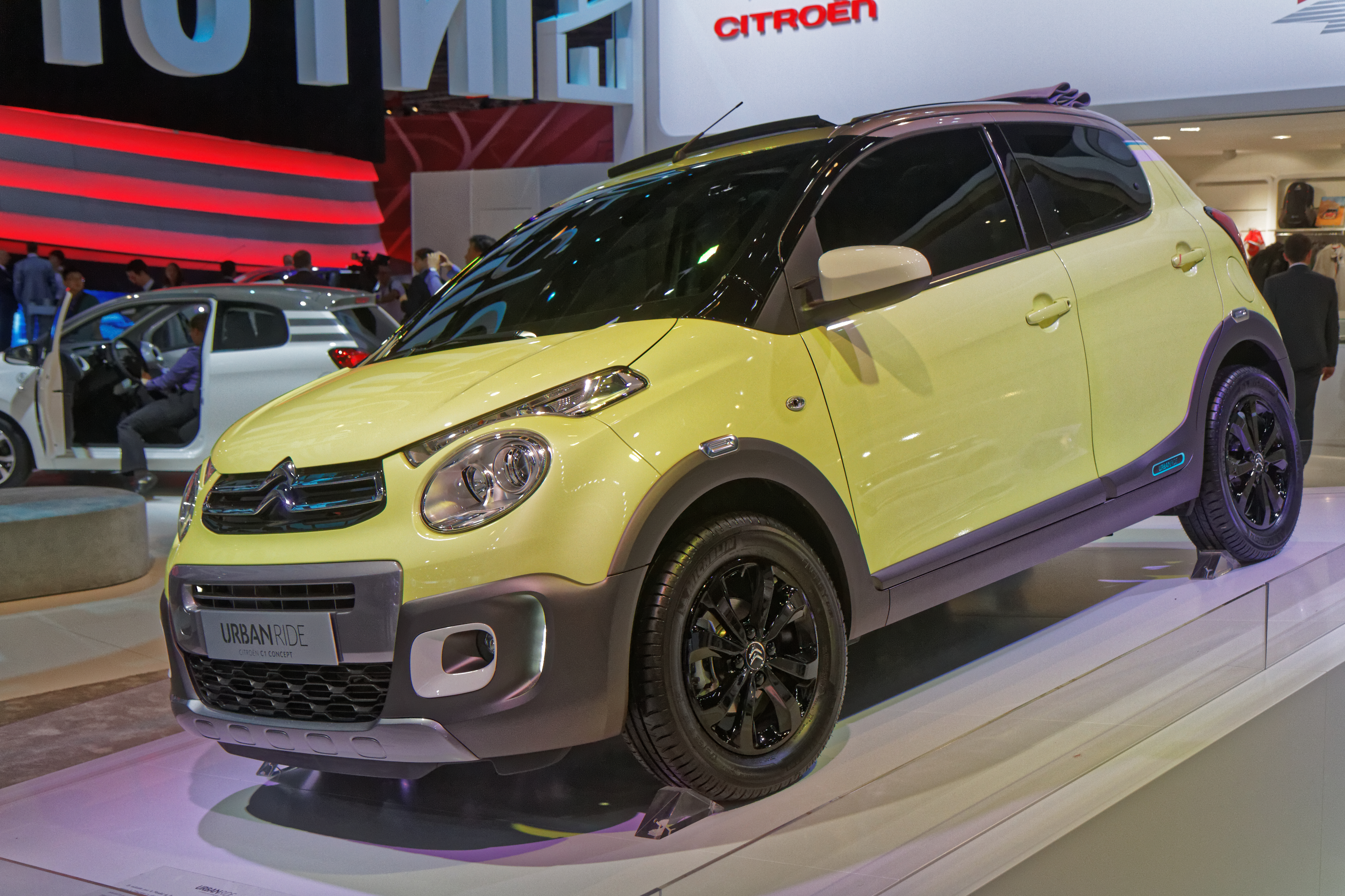 Une Citroën C1 Urban ride présentée lors du mondial de l'automobile de Paris 2014.